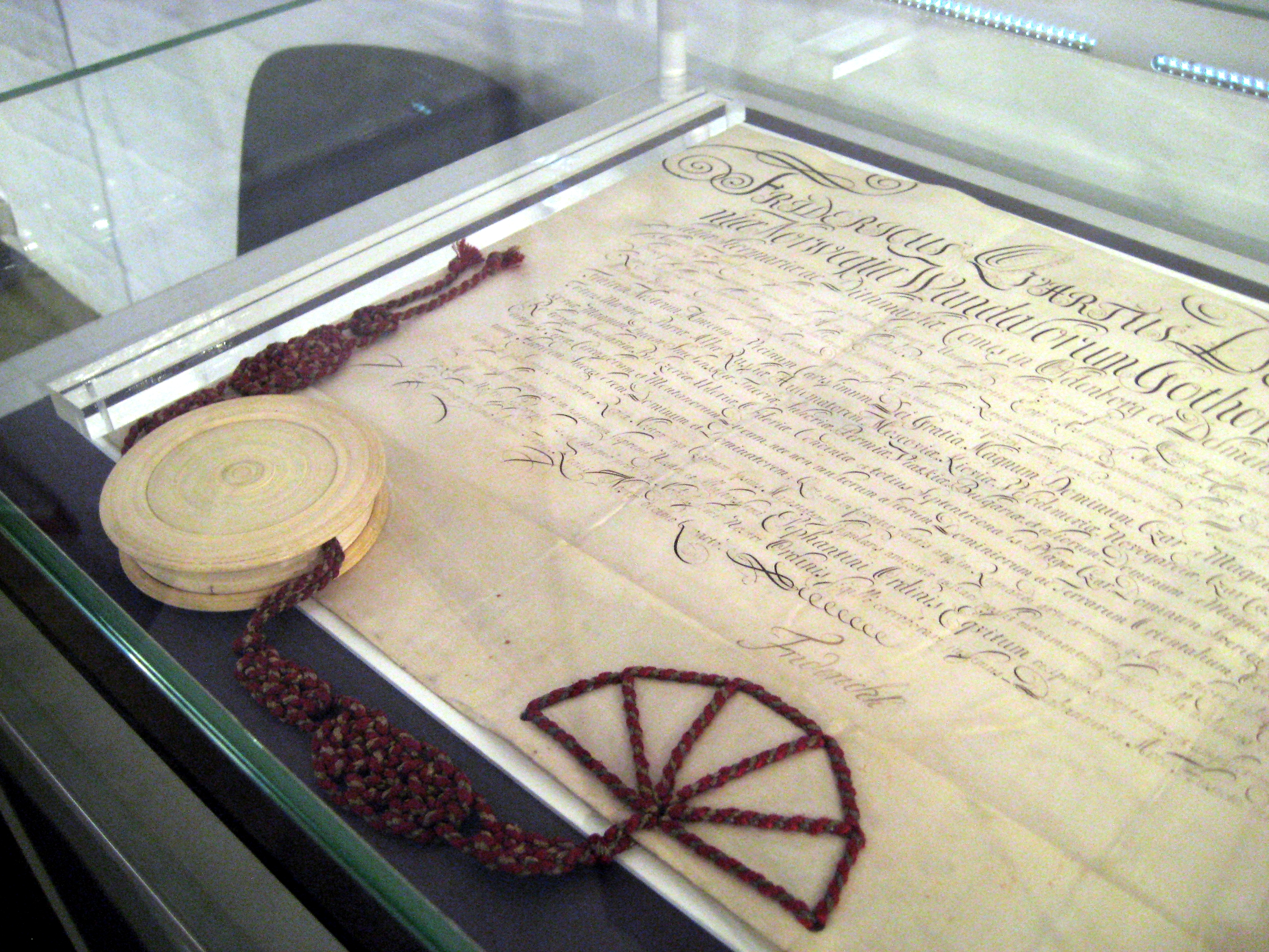 Грамота датского короля Фредерика IV о награждении орденом Слона Петра I. 18 февраля 1713 года. РГАДА